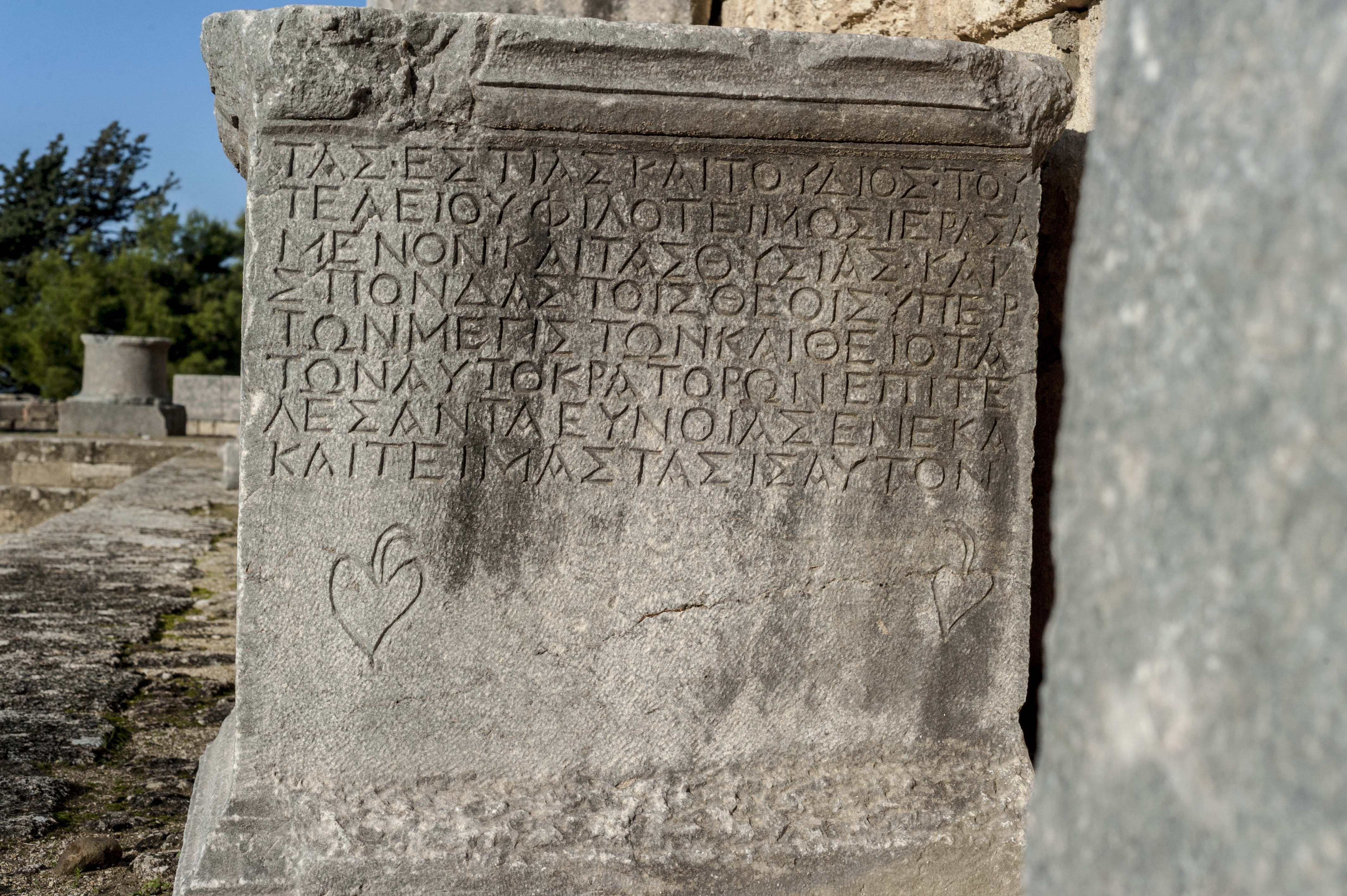 Τυπογραφικό κόσμημα Hedera.